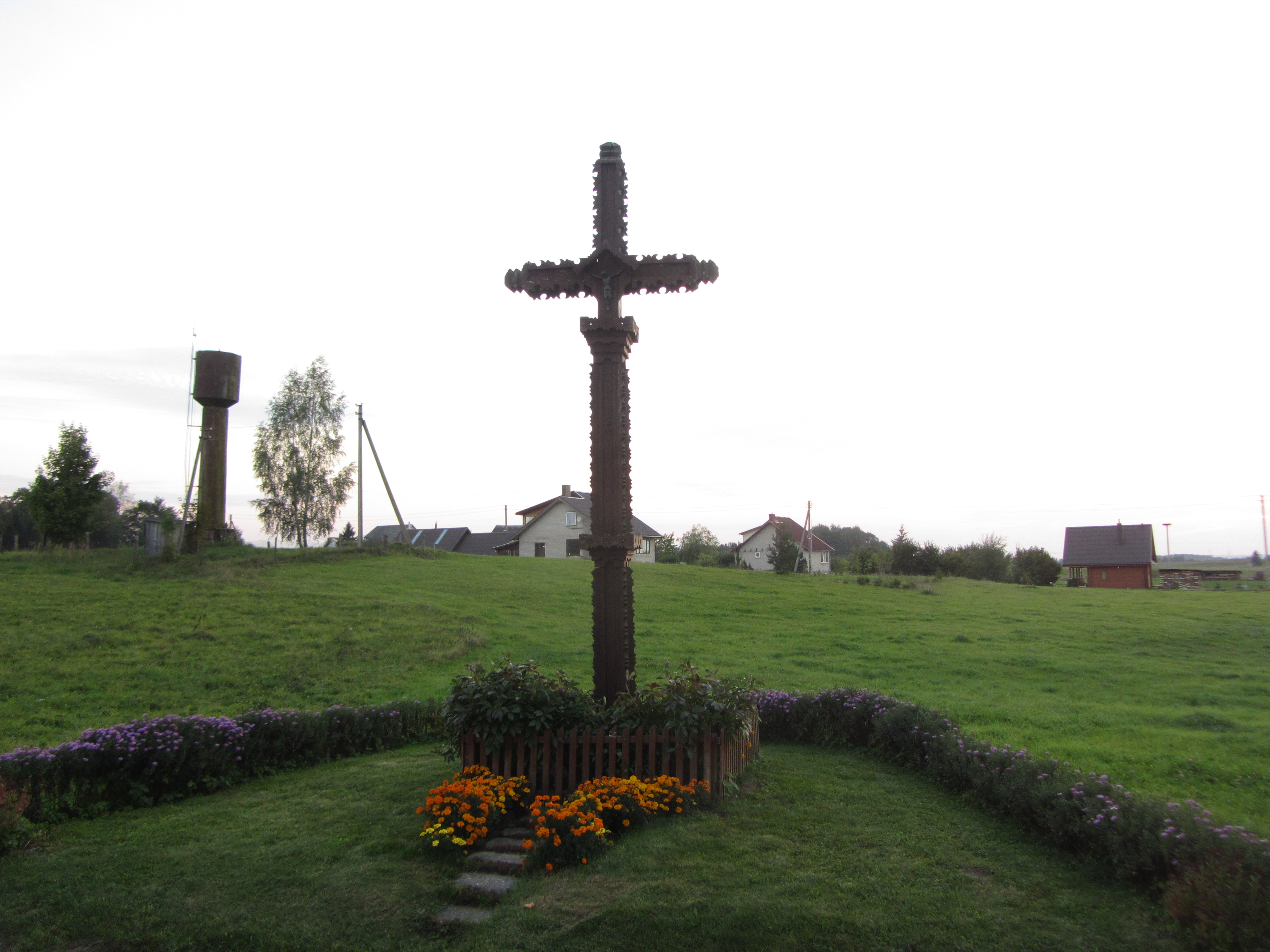 Biliakiemis 28435, Lithuania